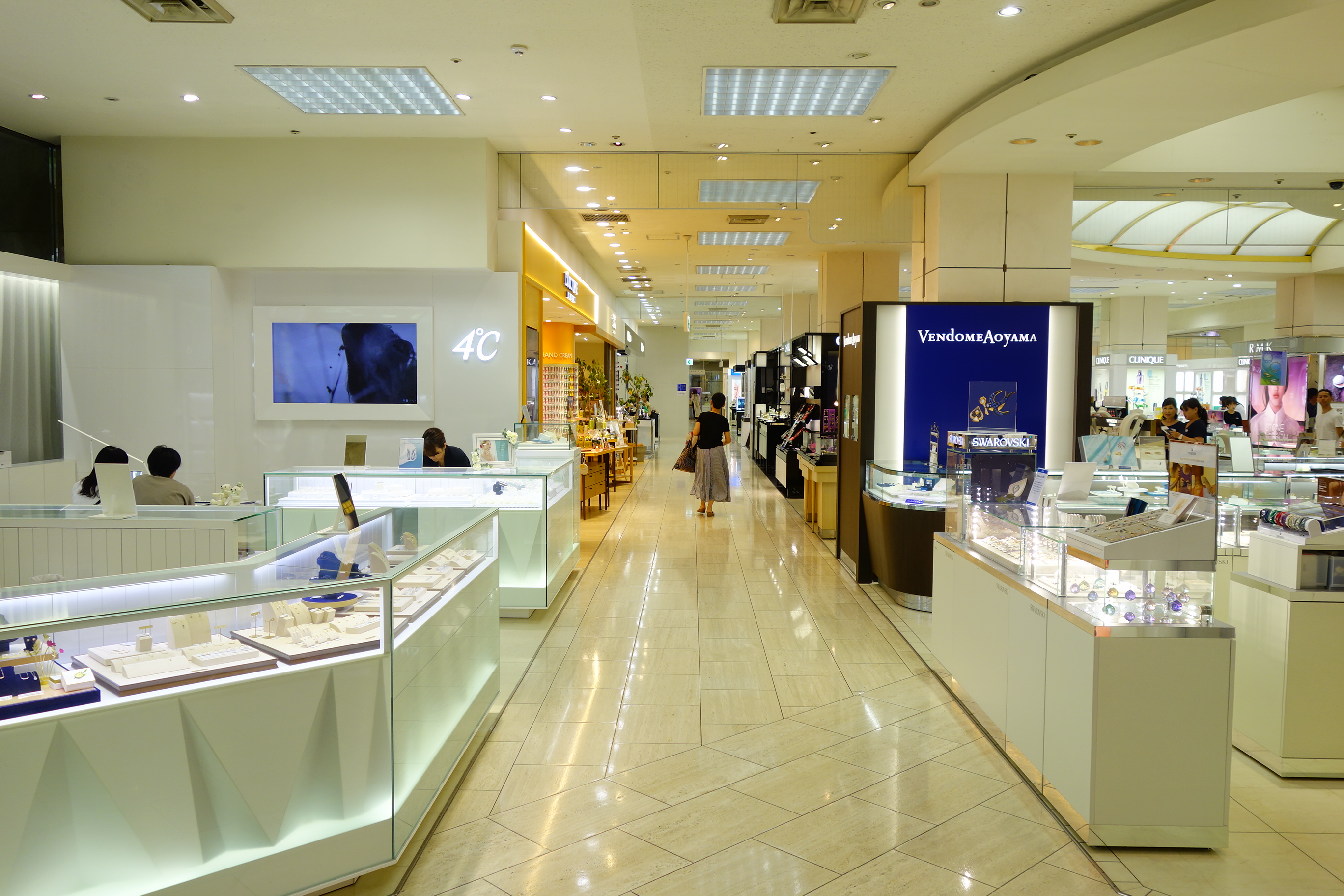 天満屋福山屋 一階ブランド街